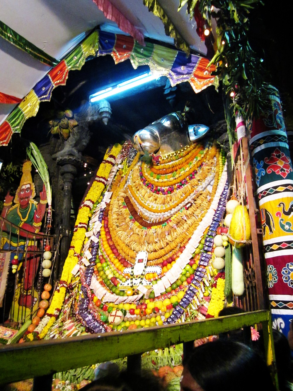 திருவண்ணாமலை கோயில் நந்தி